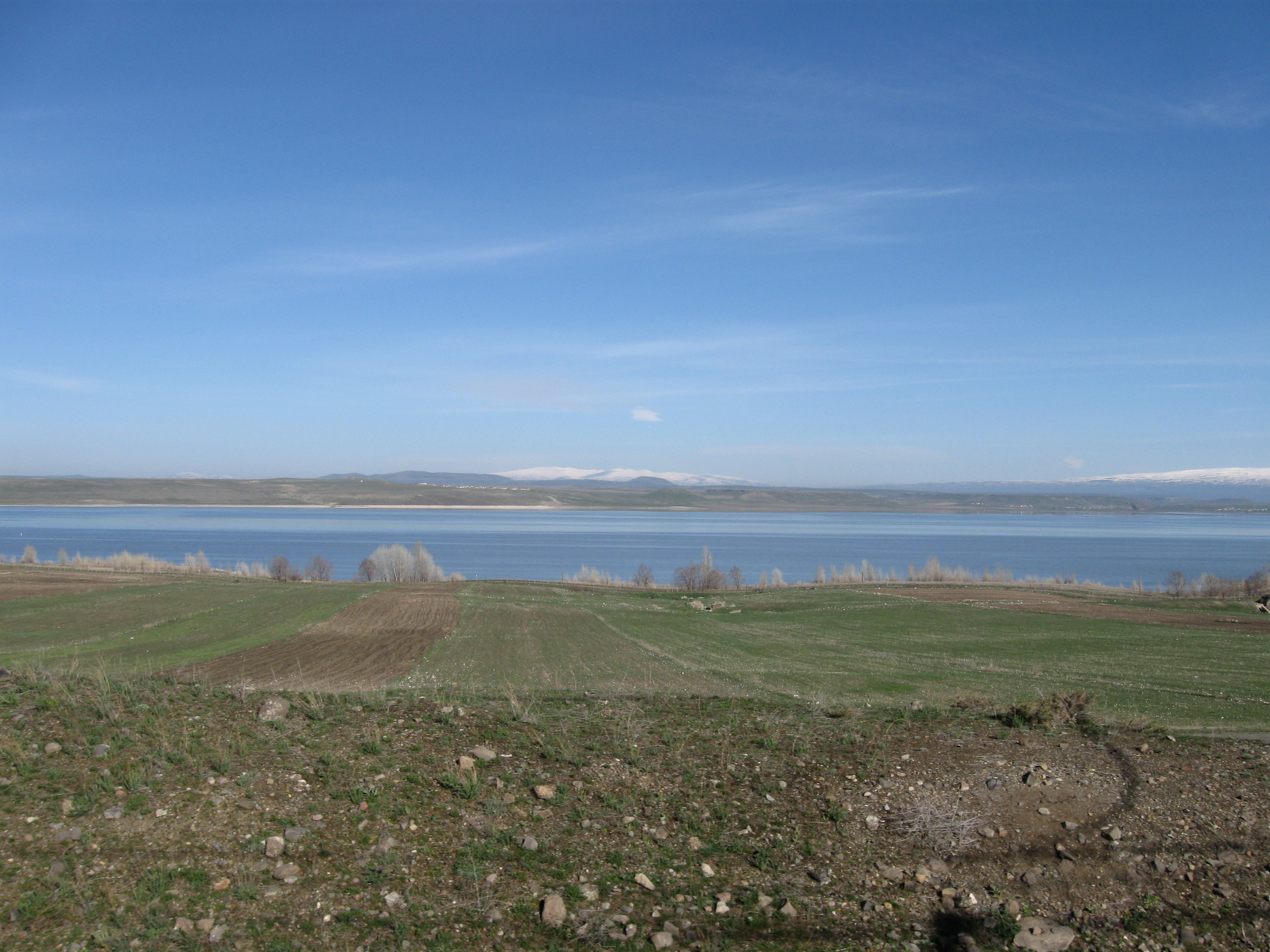 Ախուրյանի ջրամբարը1